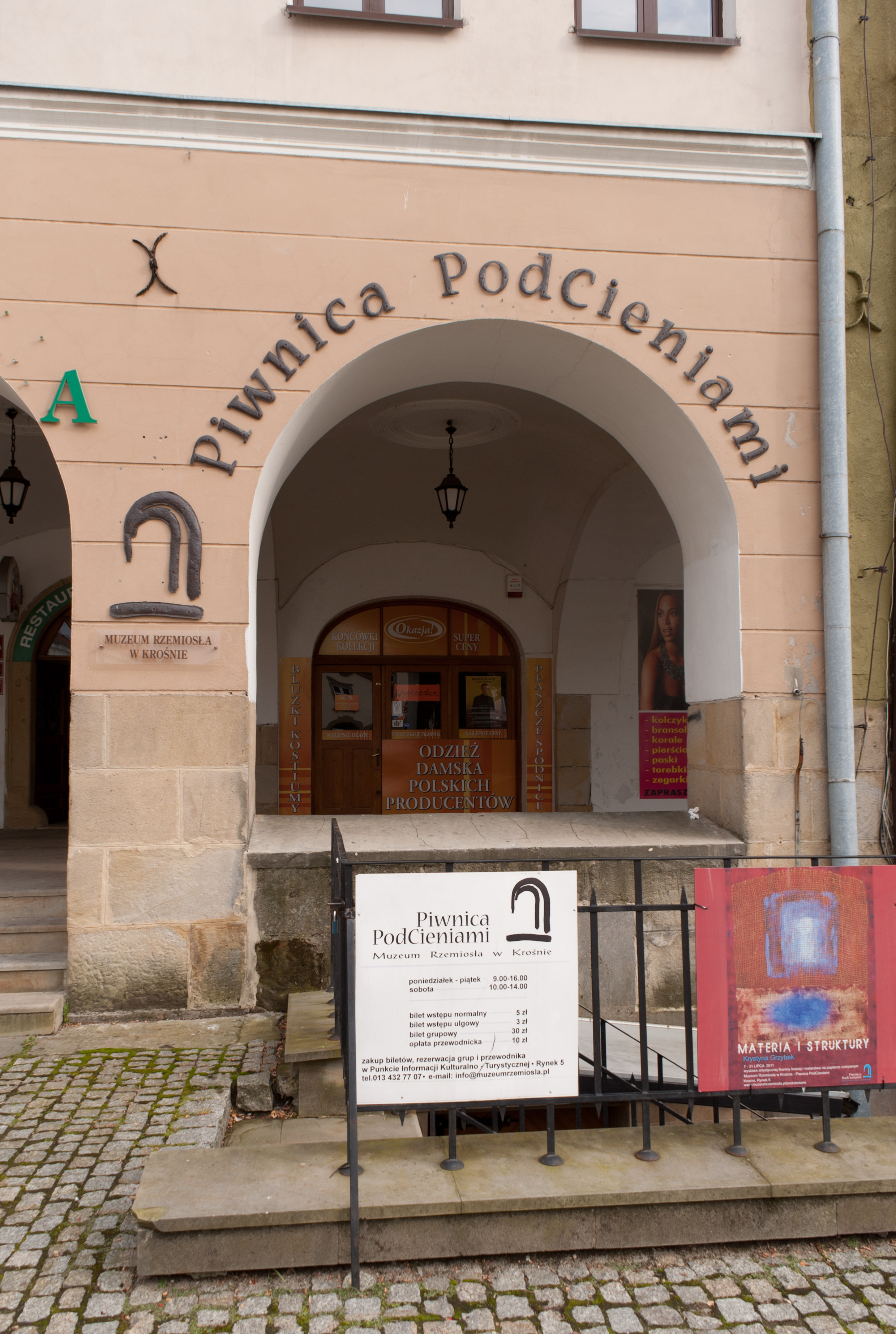 Piwnica PodCieniami, ul. Rynek 5 w Krośnie. Piwnica PodCieniami to miejsce artystyczno-kulturalnych realizacji Muzeum Rzemiosła w Krośnie. Dzięki środkom unijnym na sale wystawowo-koncertowe adaptowano pomieszczenia mieszczące się w XVI-w. kamienicy. Otwarcie Piwnicy PodCieniami miało miejsce w listopadzie 2006 roku.